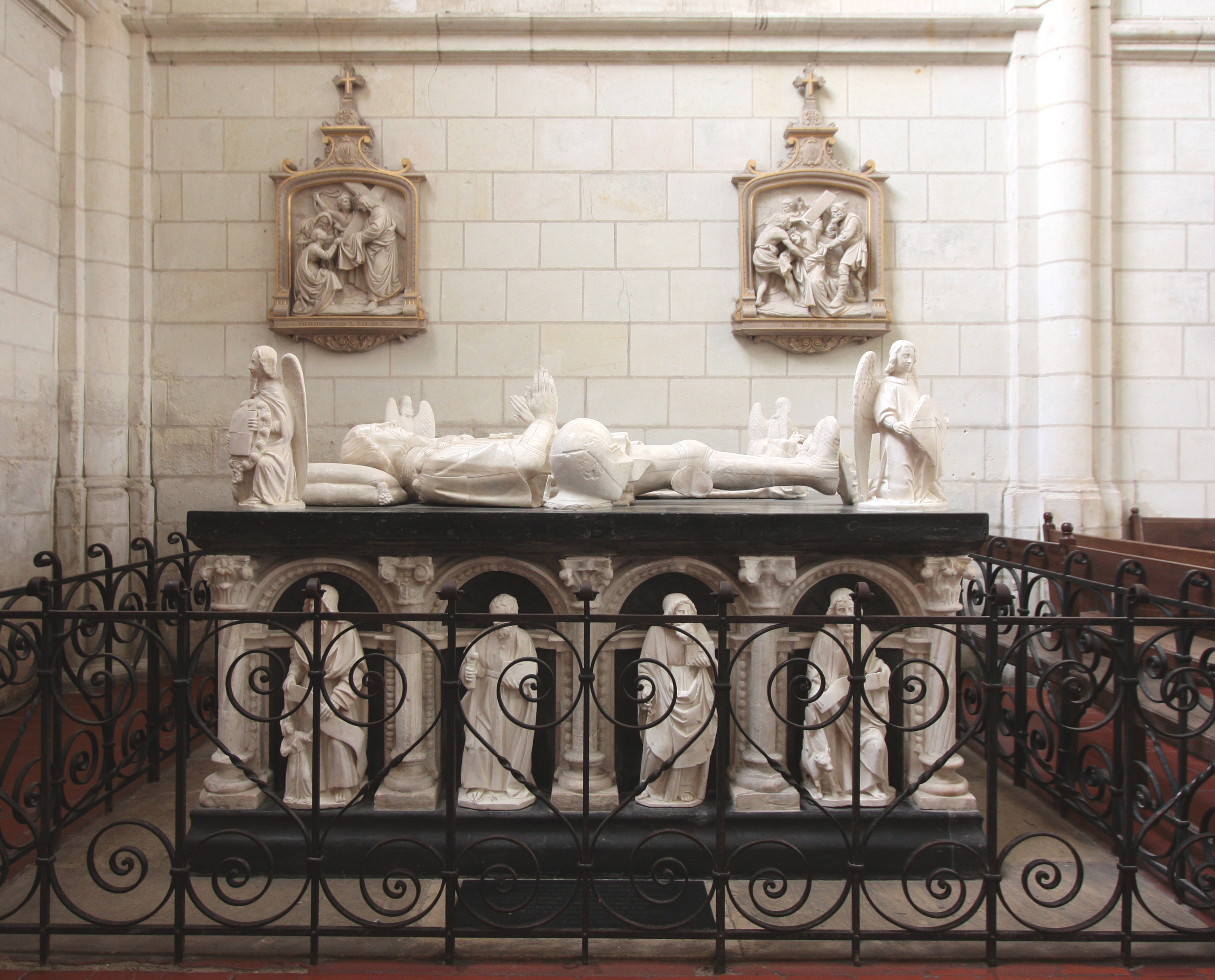 Tombeau d'Imbert de Bastarnay, de sa femme Georgette de Montchenu et de leur fils, François, en la collégiale Saint-Jean-Baptiste de Montrésor.